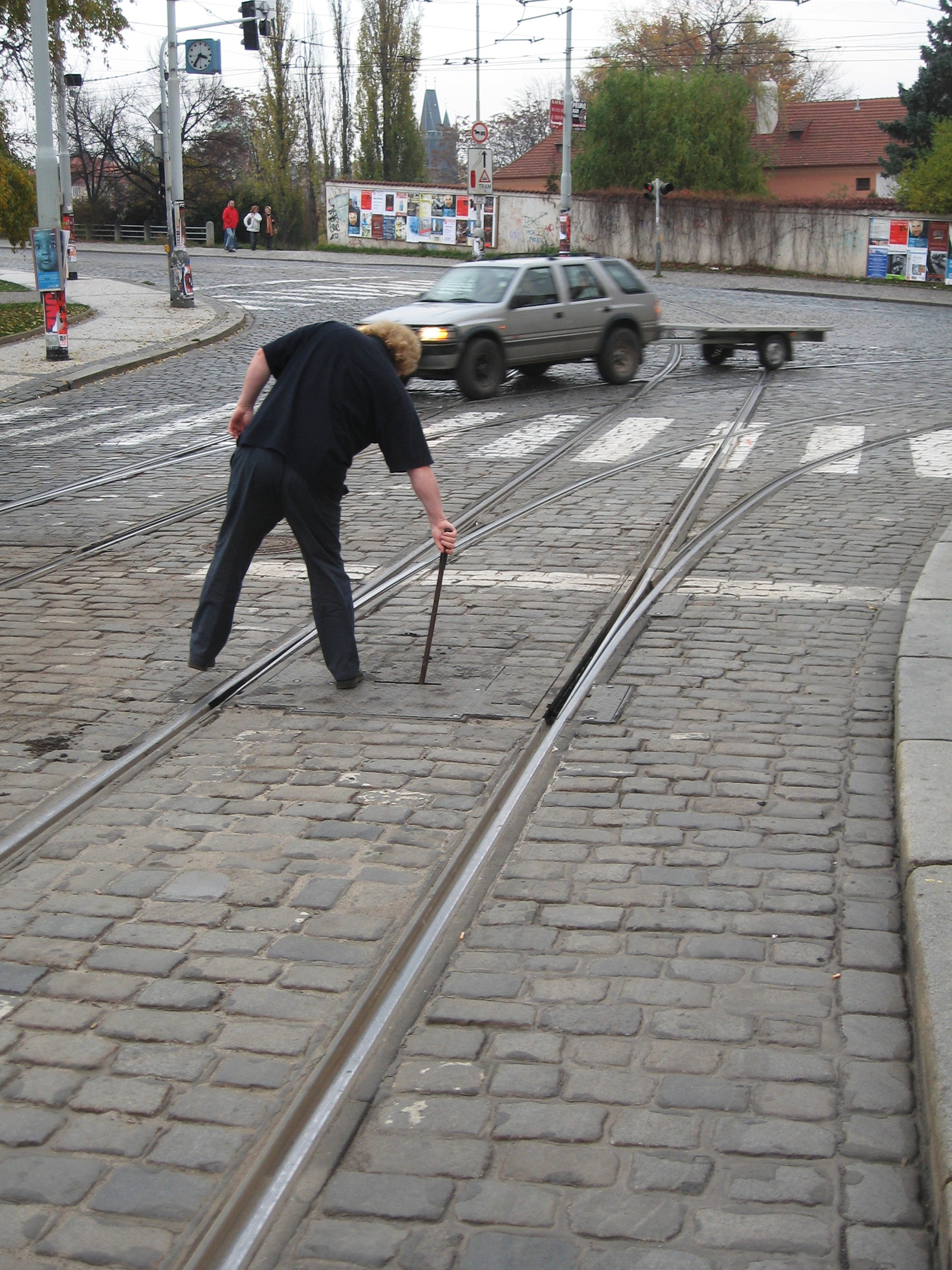 Řidič tramvaje přehazuje výhybku na křižovatce Klárov - Letenská - Mánesův most